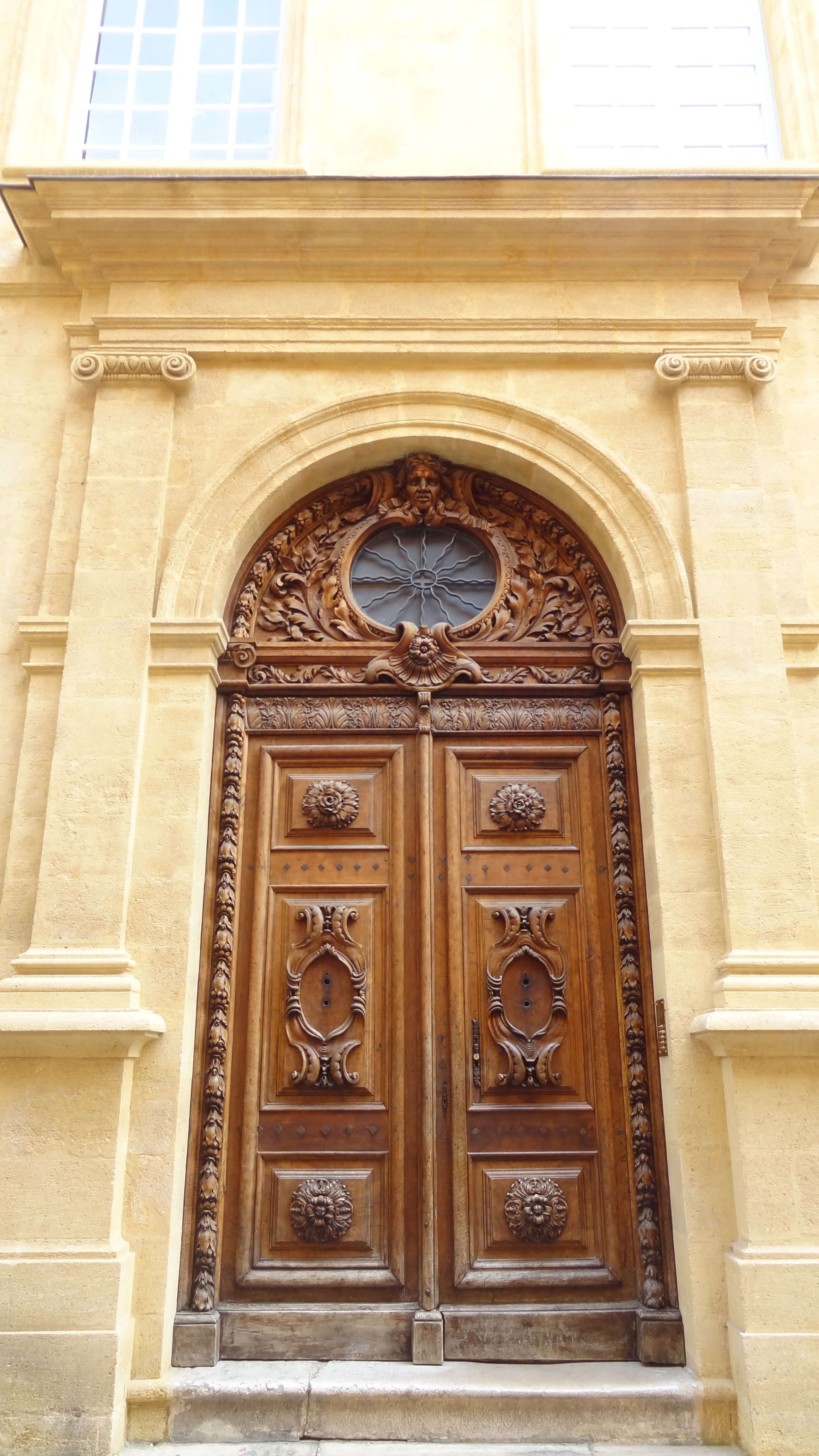 Porte de l'Hotel de Grimaldi Régusse, 26 rue de l'Opéra, Aix-en-Provence